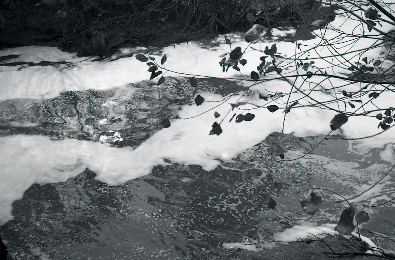 Serie fotografica : Italia, 1964 / Paolo Monti. - Strisce: 3, Fotogrammi complessivi: 15 : Negativo b/n, gelatina bromuro d'argento/ pellicola ; 35 mm. - ((I fotogrammi hanno una doppia numerazione. - Sul portanegativi: Leica Perutz 21. - Sul dorso del portanegativi Monti specifica: "Inquinamento acque industriali. Olona". - Fonte: Agenda di Paolo Monti: Foto Leica 2 / 111 - 285 (1934-1965), presso Archivio Paolo Monti